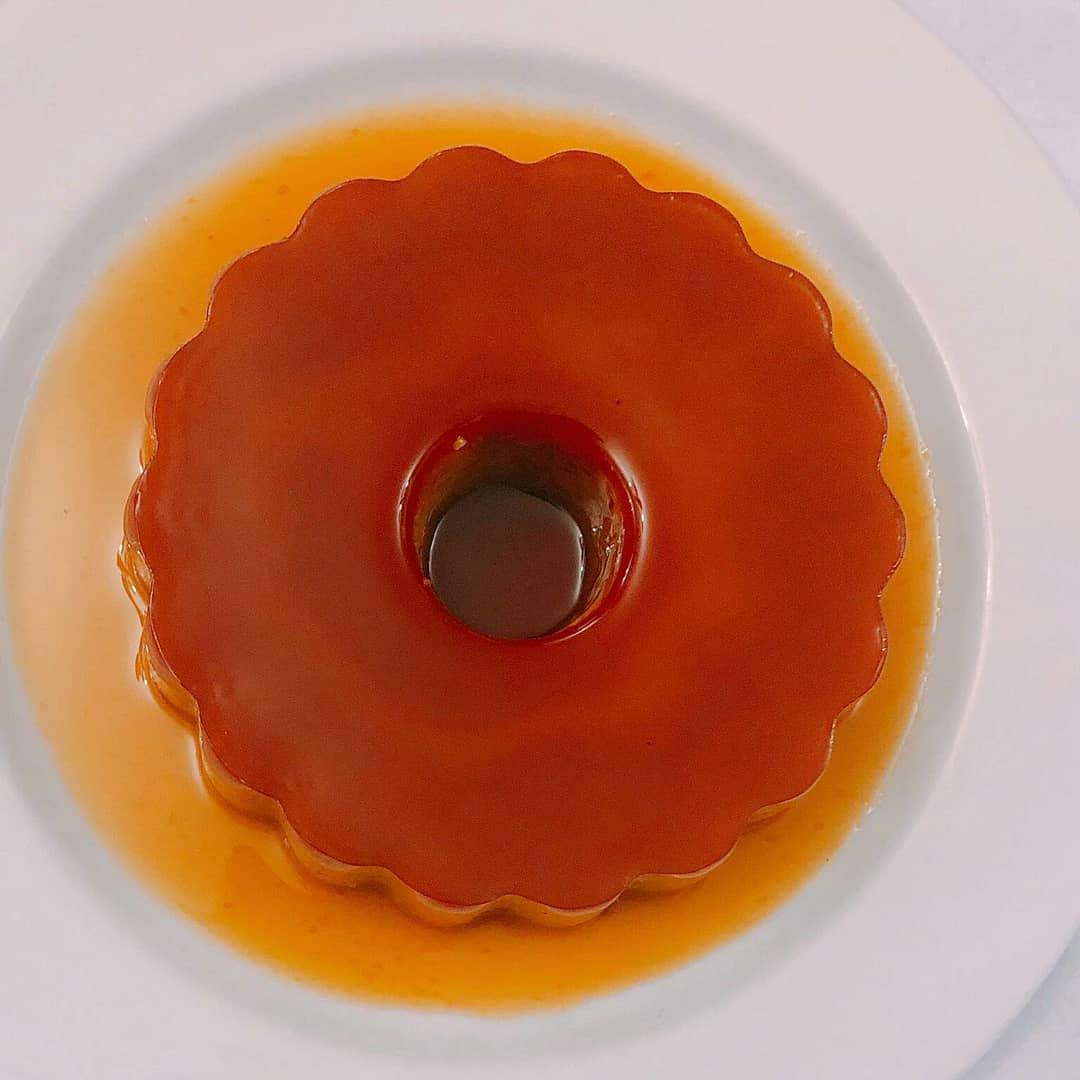 Imagem de um Pudim de Abade Priscos confecionado de acordo com a receita original.